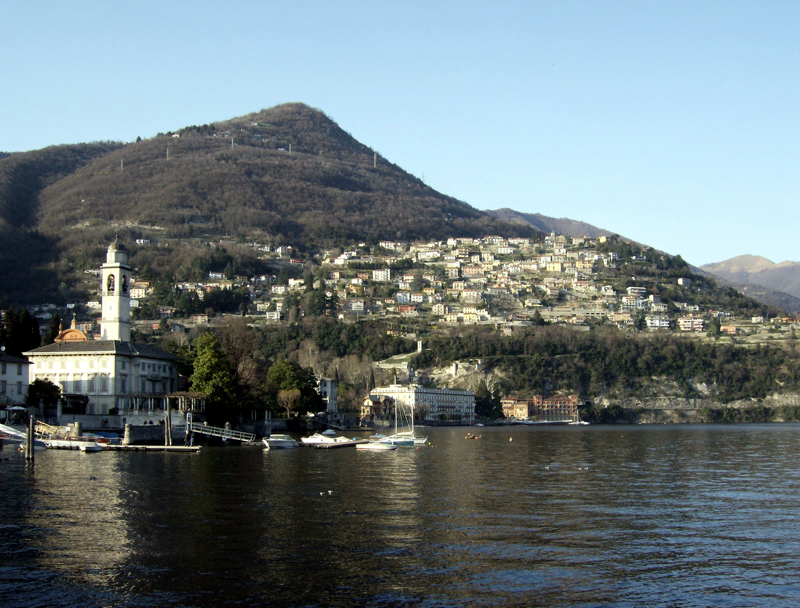 Cernobbio